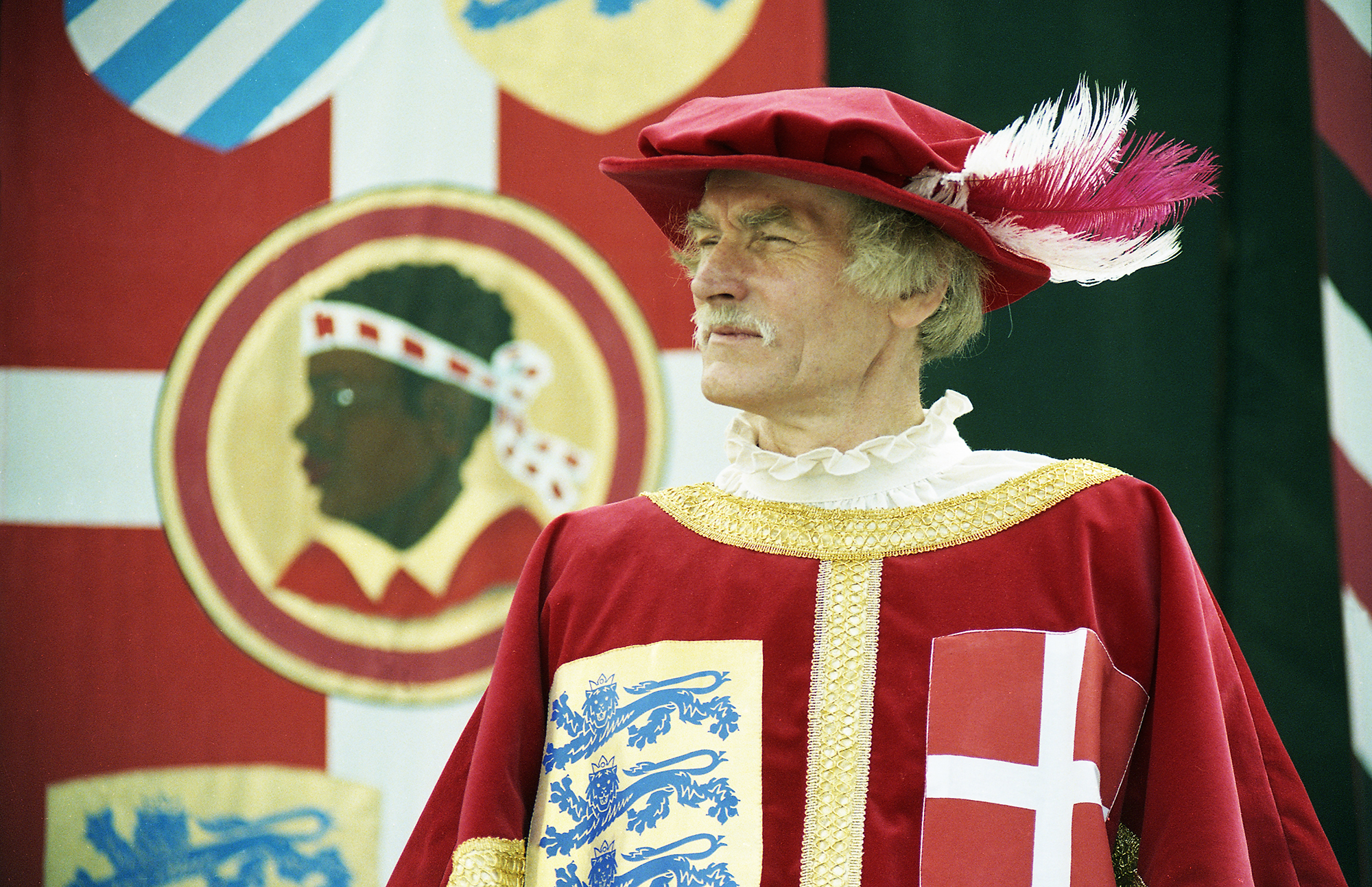 Jüri Kuuskemaa, kunstiajaloolane vanalinna päevadel 99